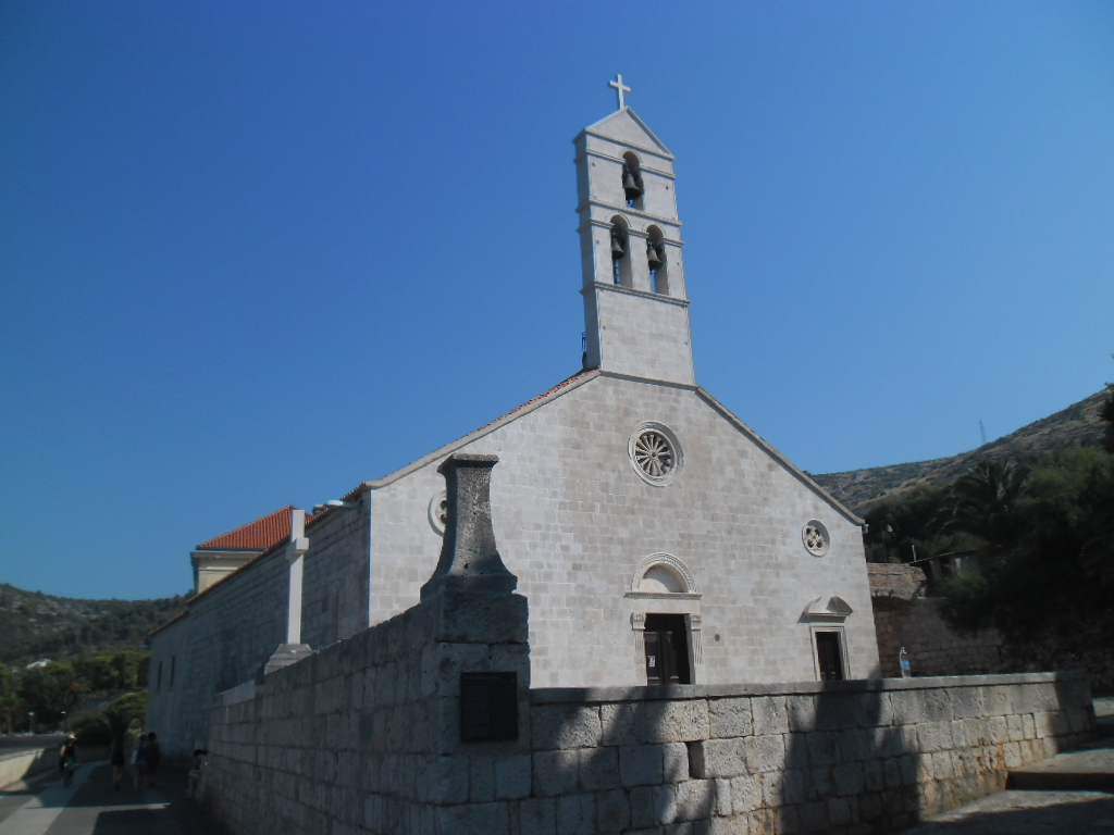 grad Vis